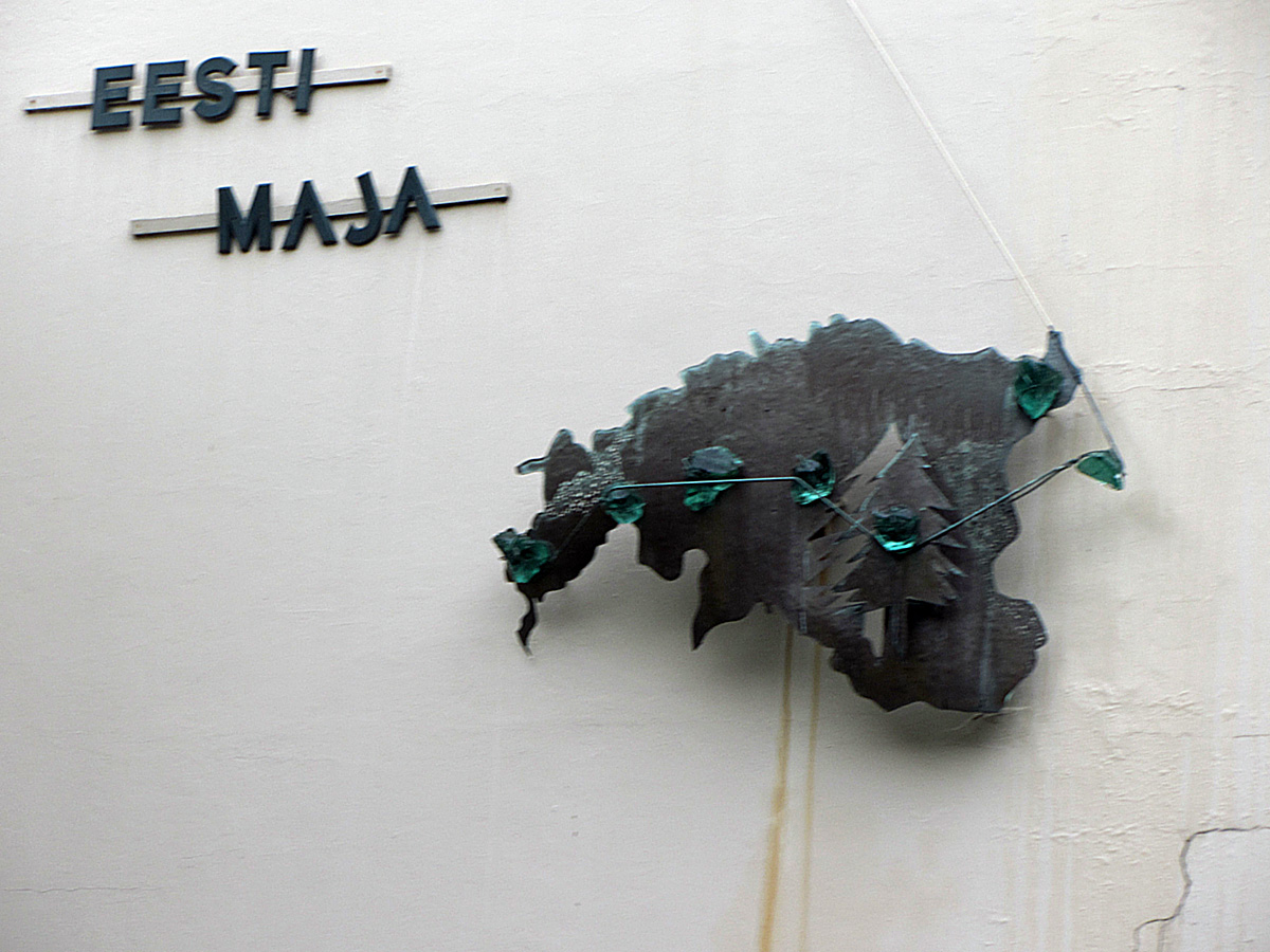 Sydney Eesti Maja